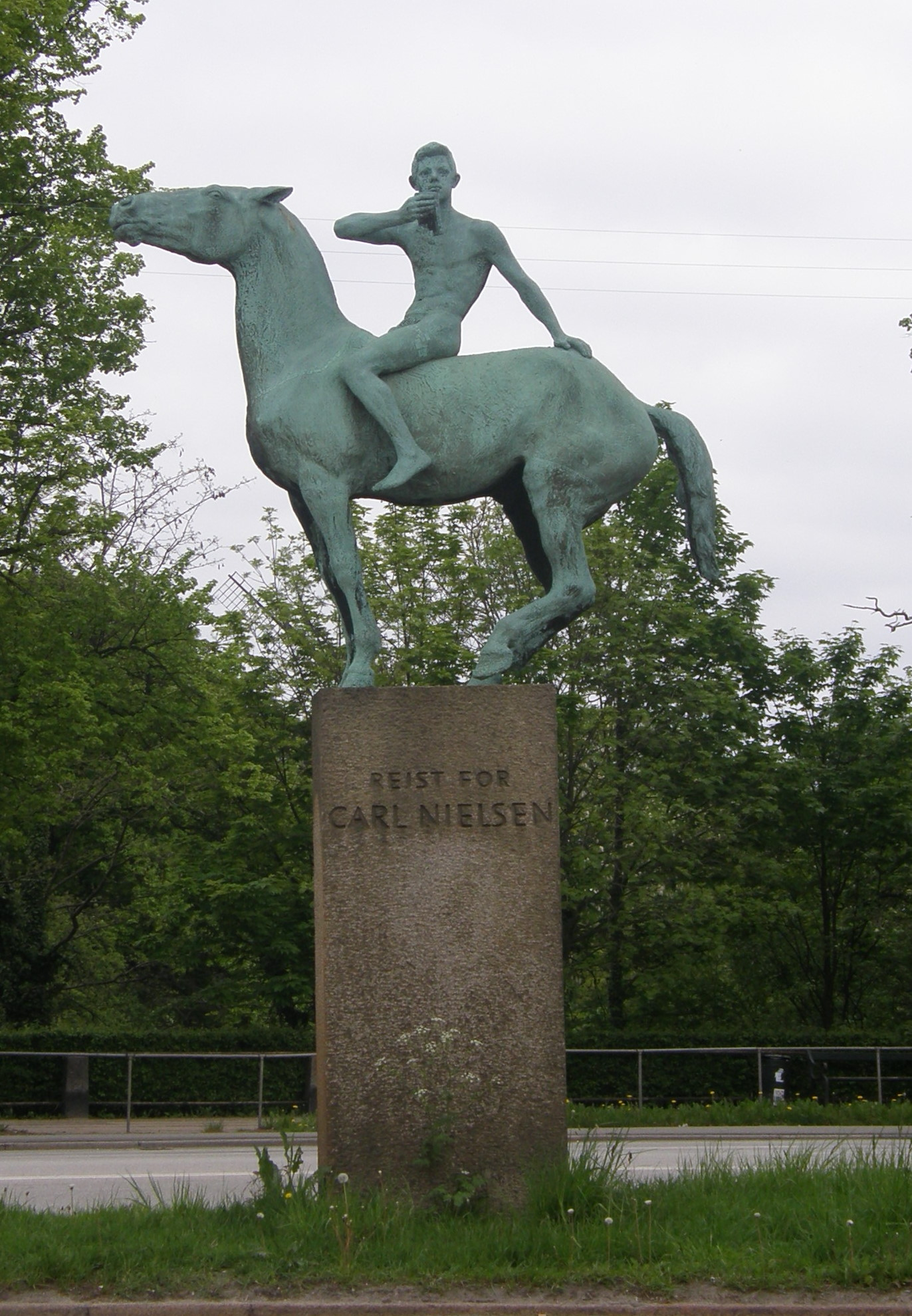 Carl Nielseni monument Kopenhaagenis. Skulptor Anne Marie Carl-Nielsen (1863–1945)